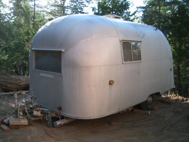 1958 Airstream Traveler 018